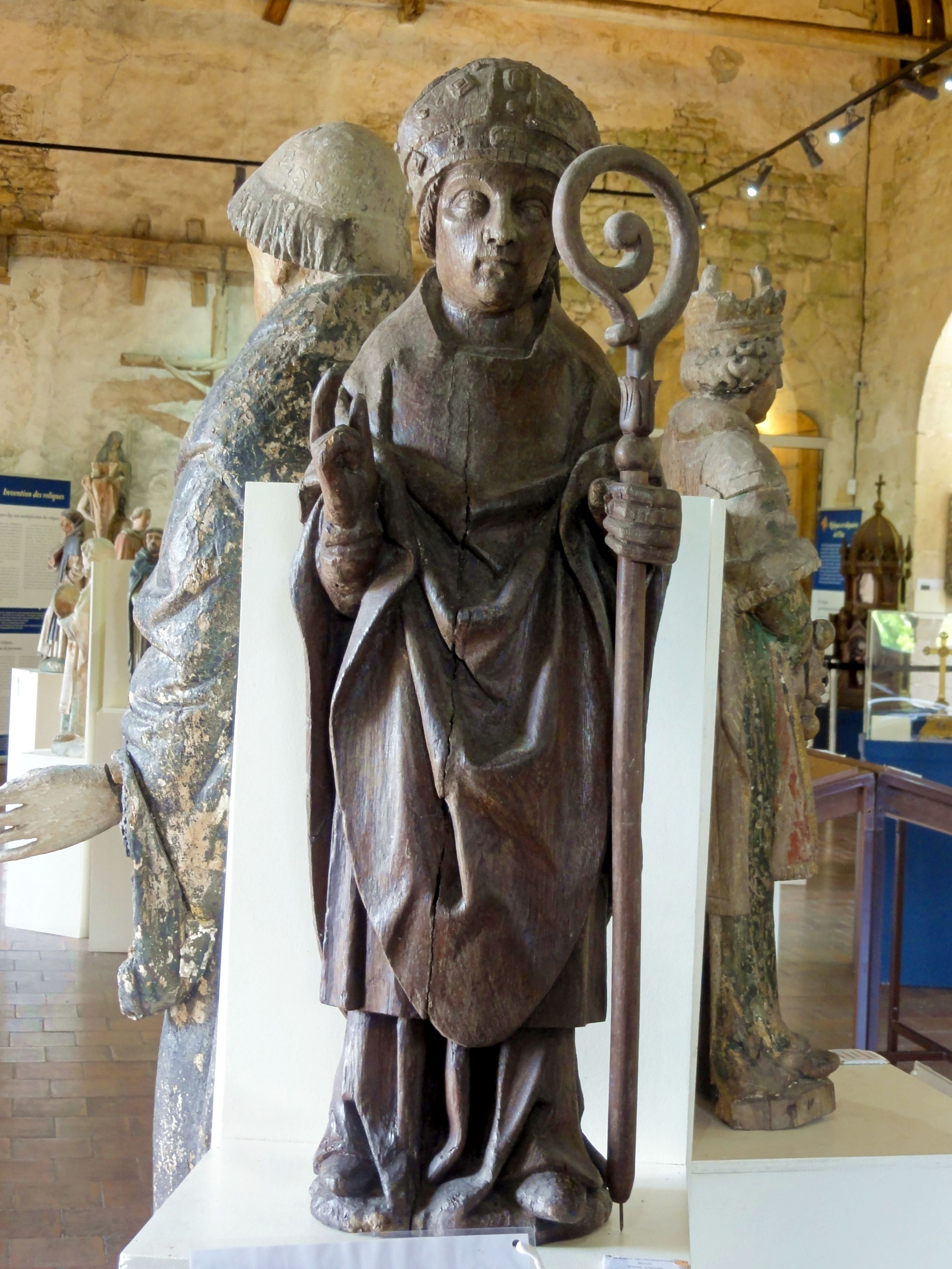 Statue de saint Guignefort, XVIe s. Proviendrait d'après la base Palissy de l'église St Denis de Crépy-en-Valois.